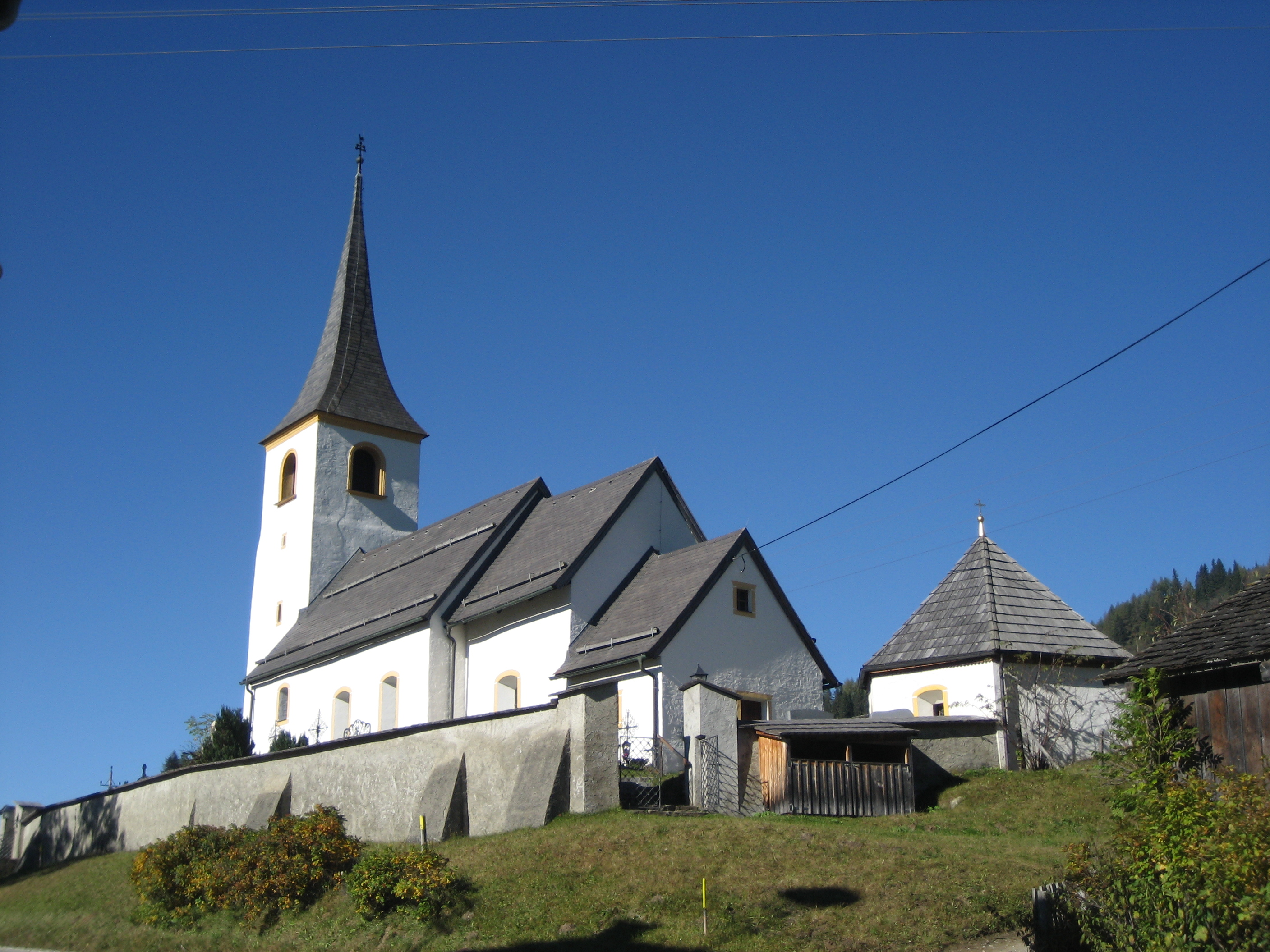 Kath. Pfarrkirche hl. Johannes d. T., Seetal. Gemeinde Tamsweg.